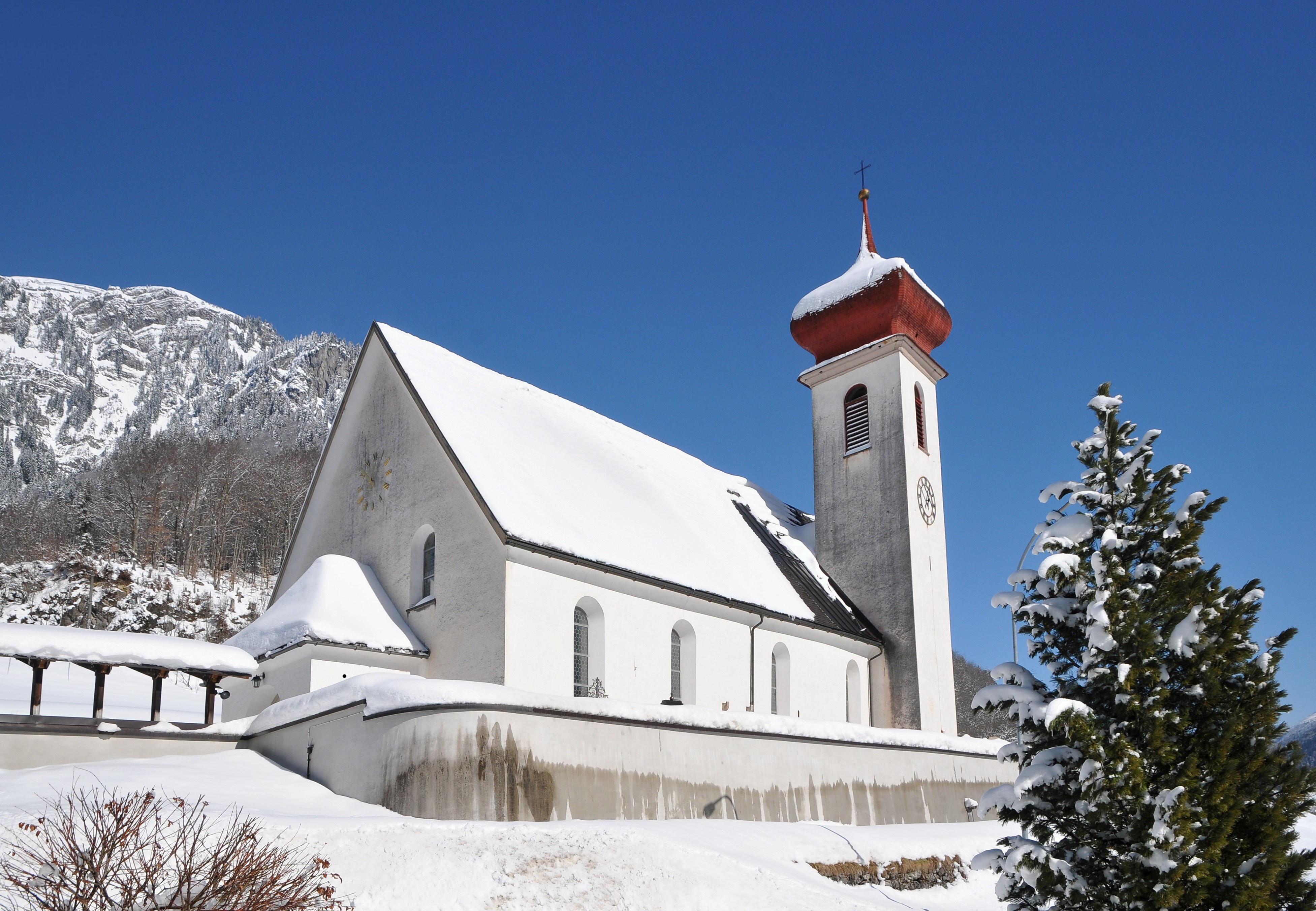 Kath. Pfarrkirche hl. Oswald und Friedhof in Dalaas 223.